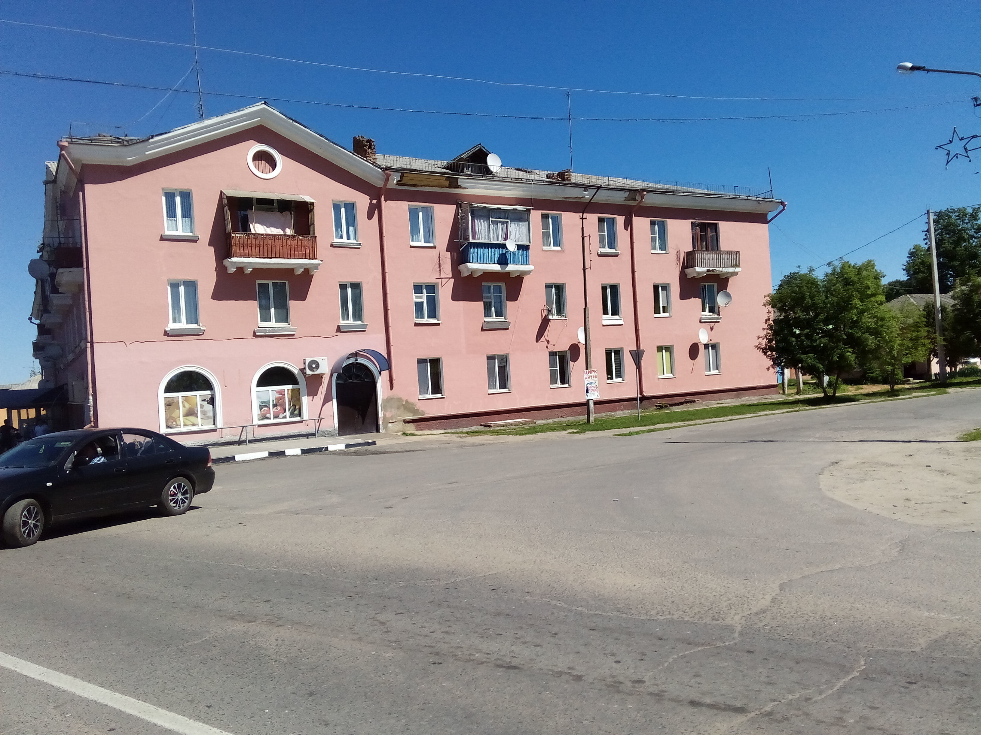 Жилой дом в Кричеве (№12) на перекрёстке улиц Фрунзе и Коммунистическая